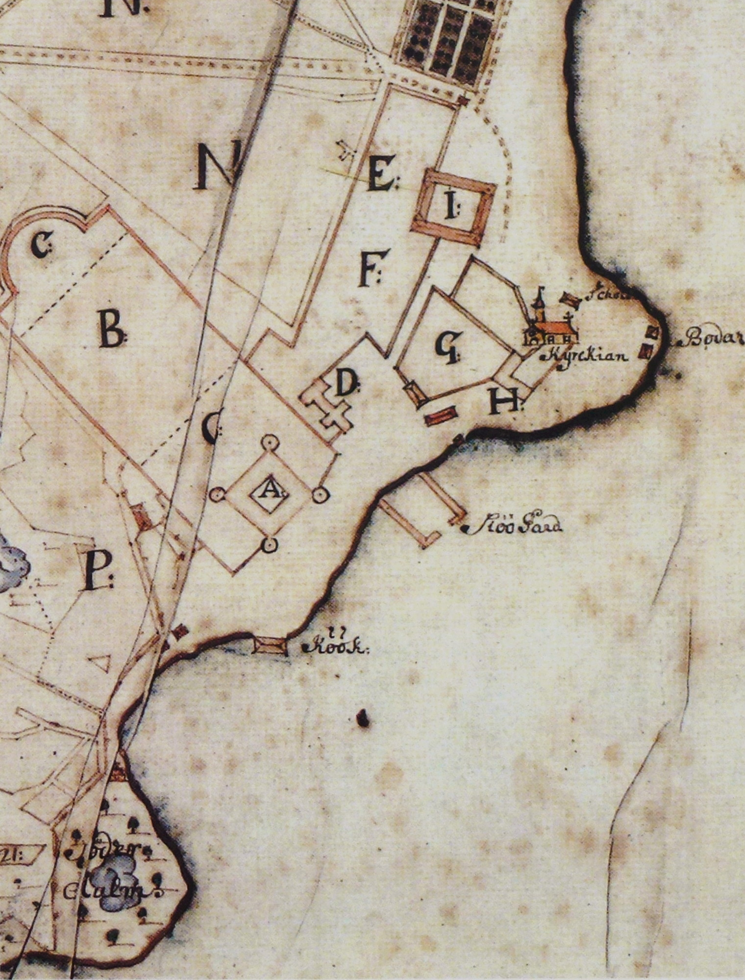 Skokloster, anläggningen på en lantmäterikarta från 1704